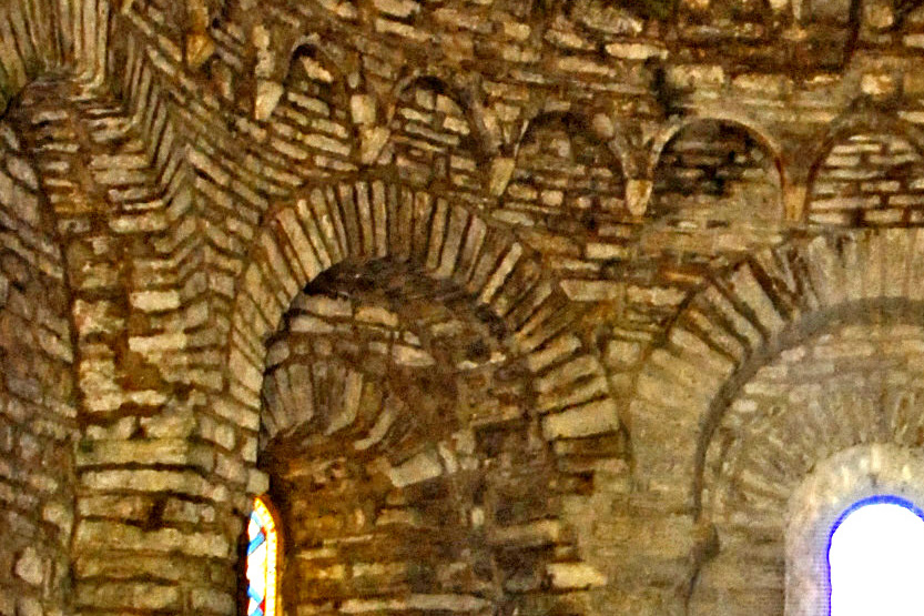 Saint-Hymetière, Detail Blendarkaden im Chor